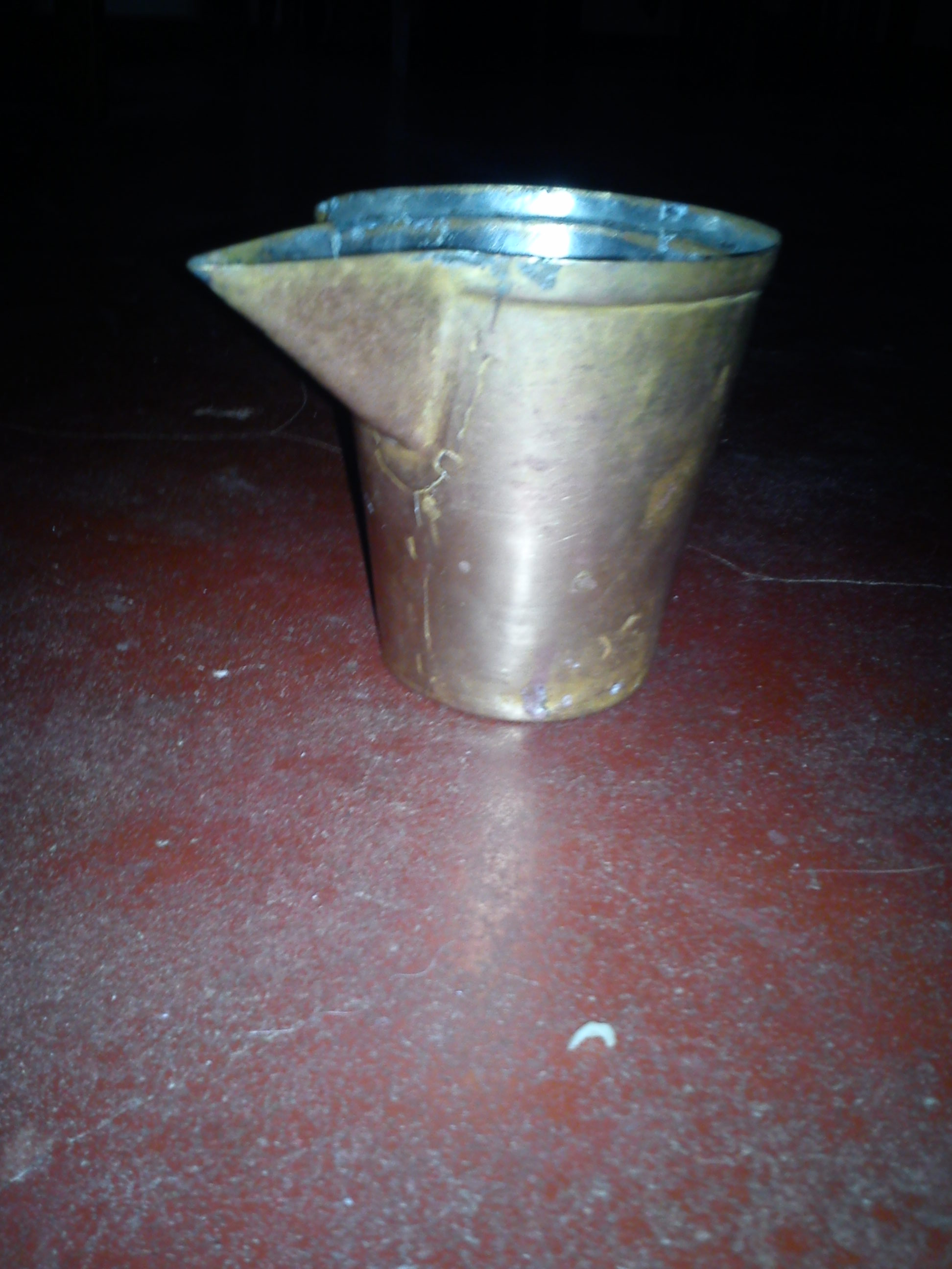 வாய் வைக்காமல் திரவ உணவு அருந்தும் மூக்குப்பேணி